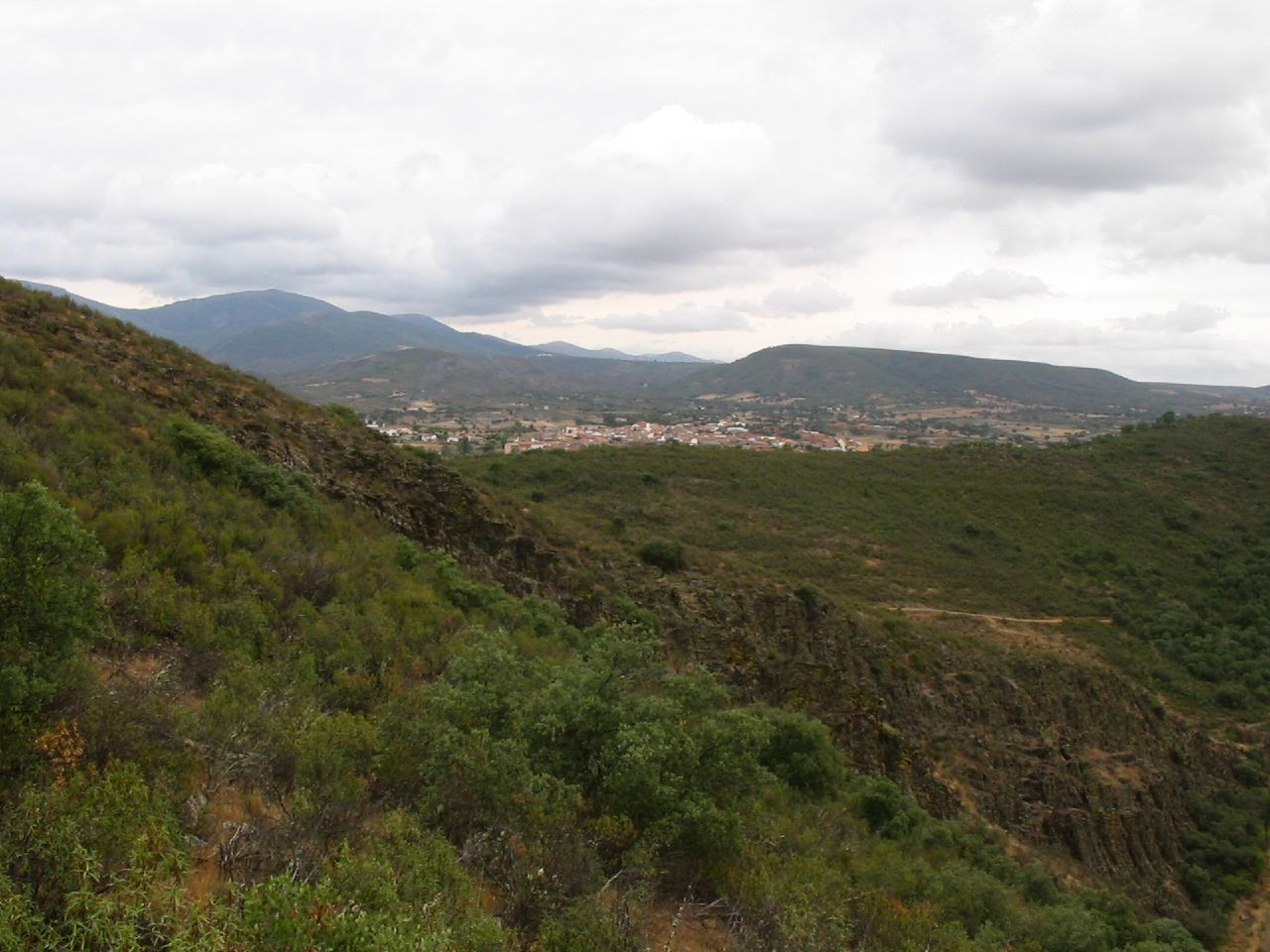 Ruta del Boquerón - Navas de Estena "Montes de Toledo"